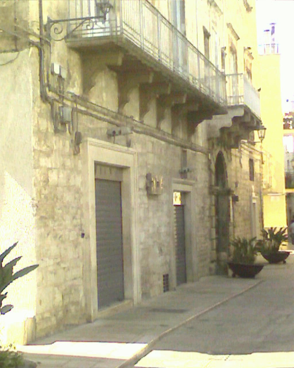 palazzo maffei- Modugno (bari)-Italy